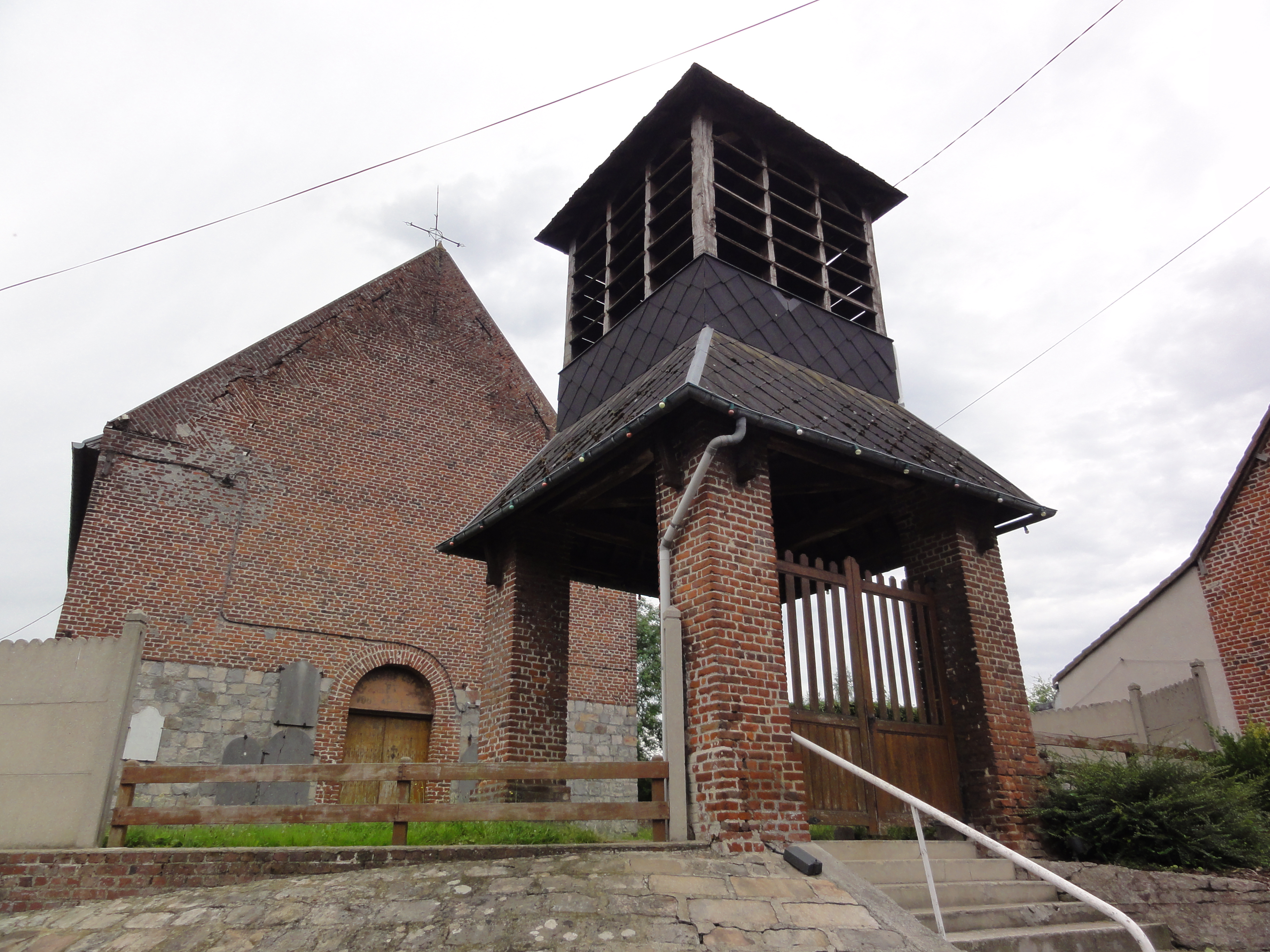 Orsinval (Nord, Fr) église St.Nicolas avec campanile